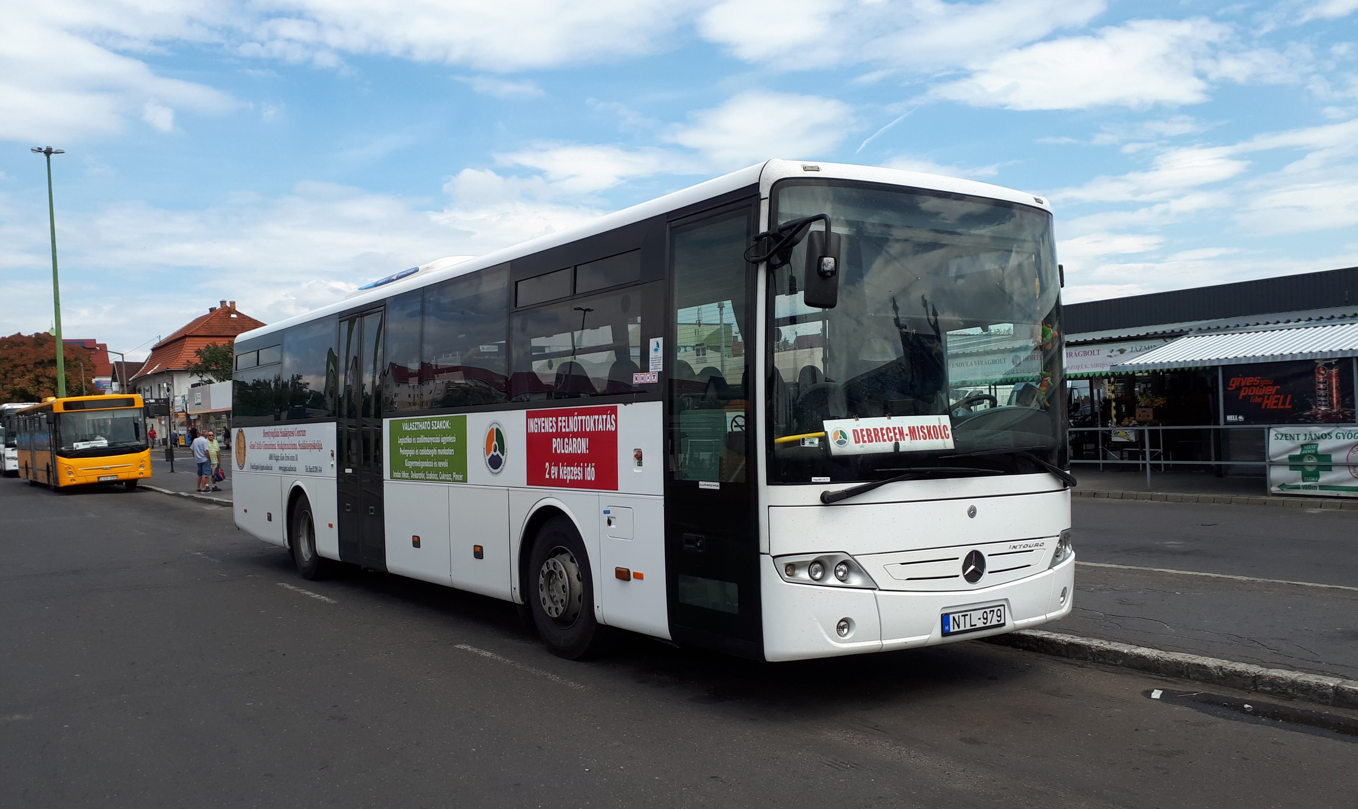 Az ÉMKK NTL-979 rendszámú Mercedes Intouro busza Miskolcon, a 1372-es távolsági járaton.